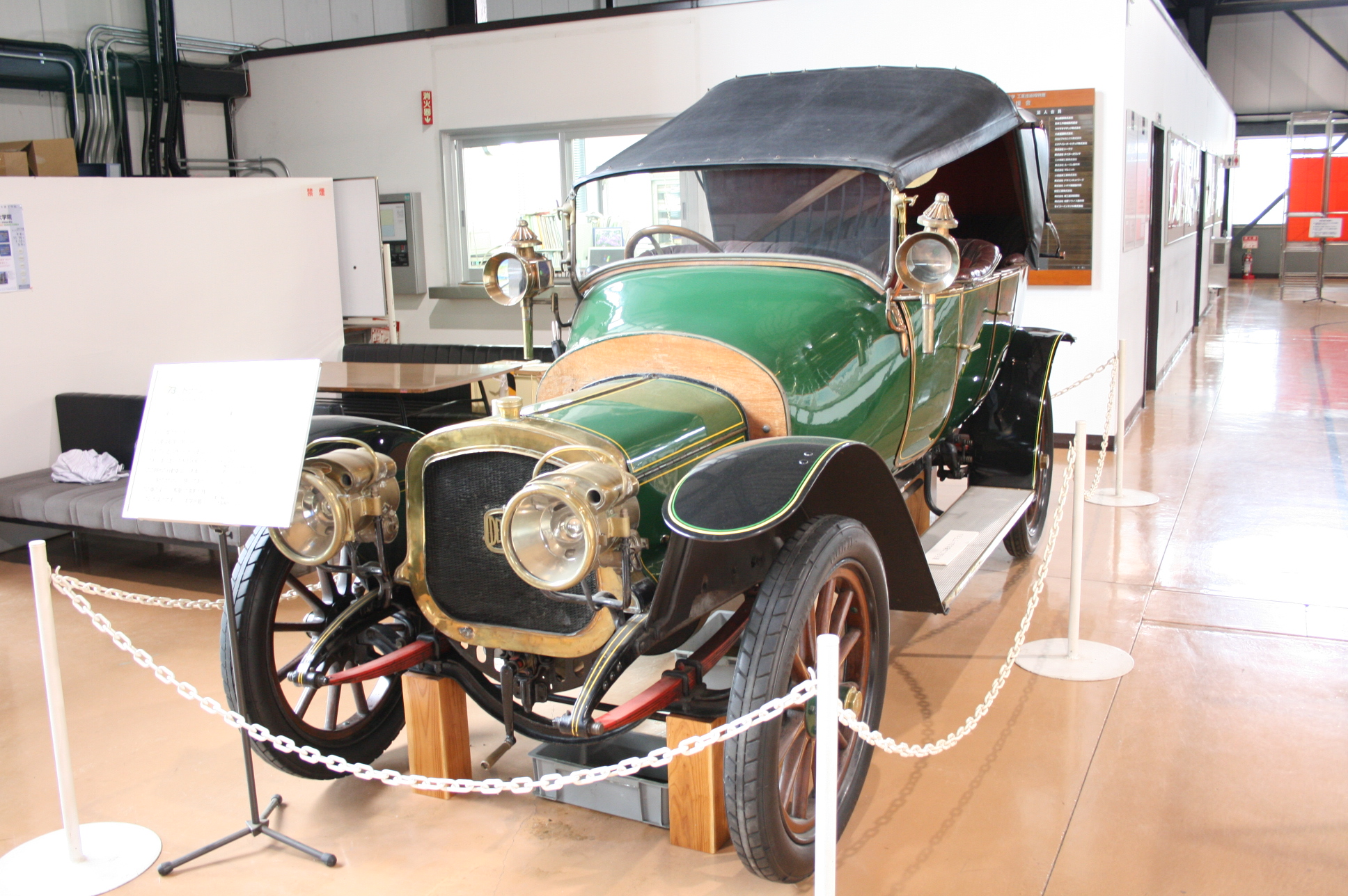 Delahaye Type32